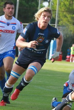 Rémy Martin (match amical Montpellier-Grenoble a Pezenas été 2011).